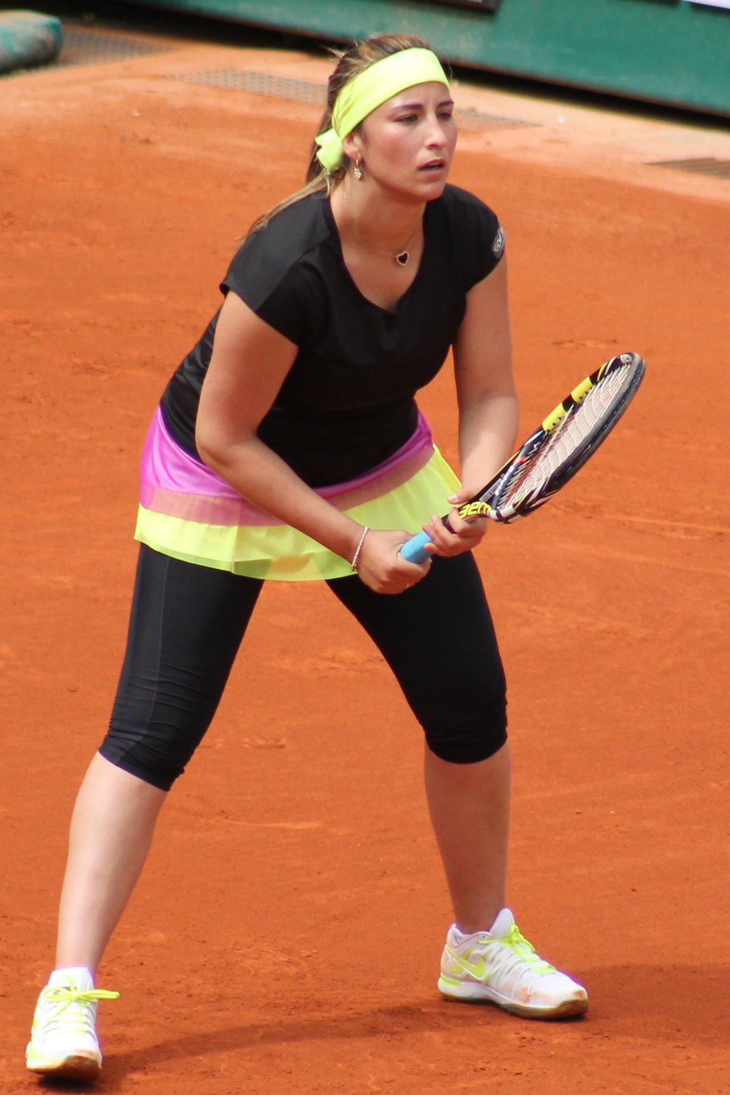 Rezai RG13